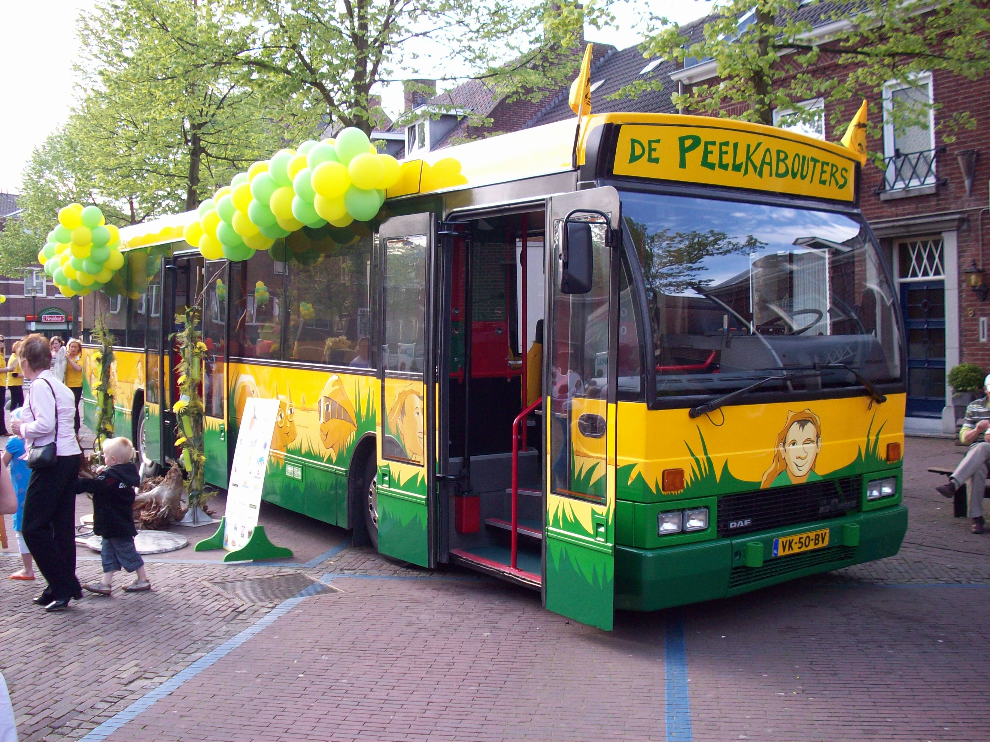 Peelkabouterbus te Horst, ex-Hermes 5380